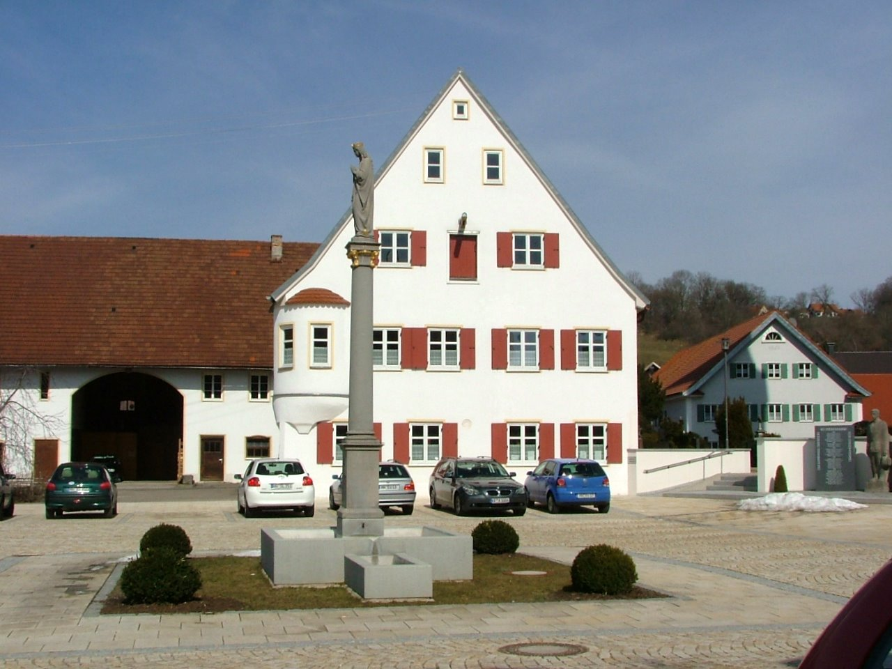 Tussenhausen Adler